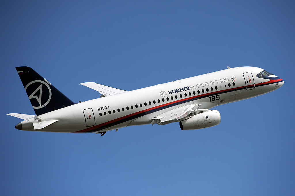 Sukhoi Superjet 100-95 в аэропорту Раменское (UUBW) во время показательных полетов на МАКС-2009